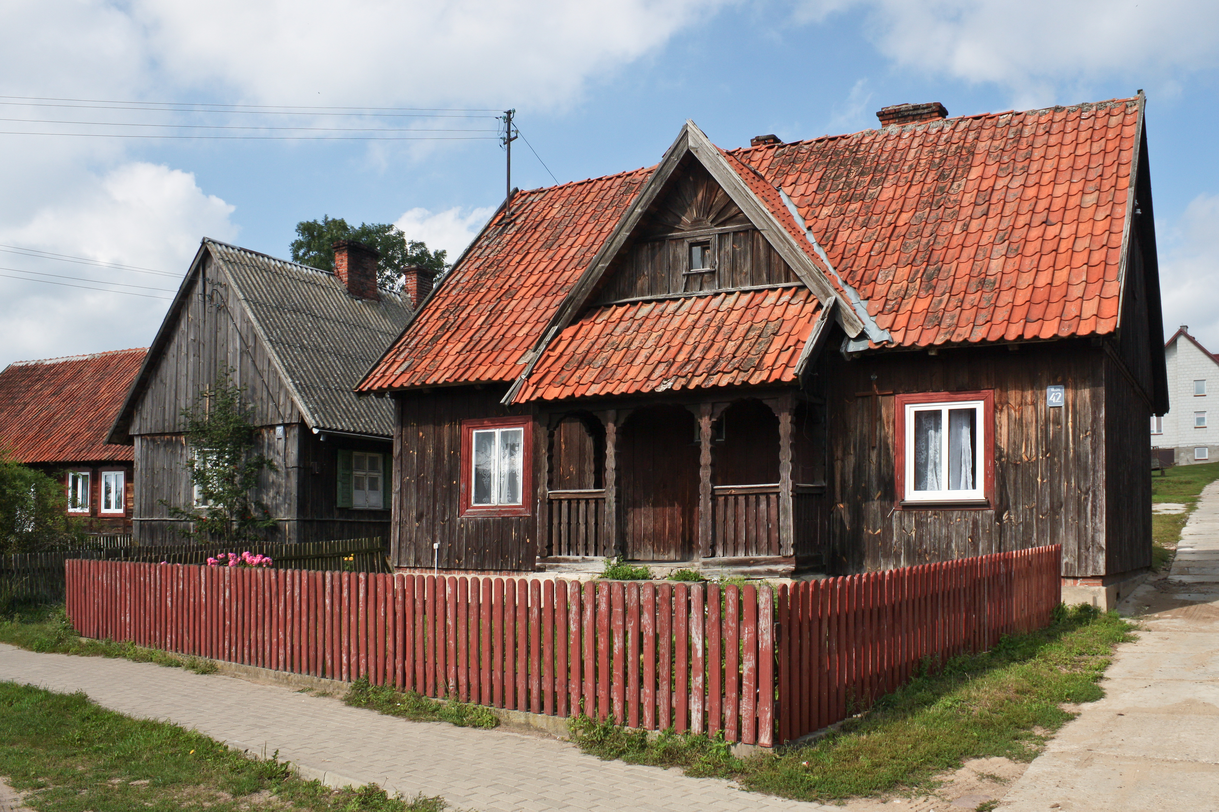 Klon